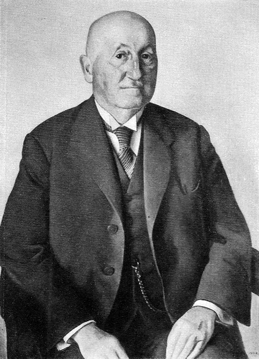 Karl Kommerell (1871-1962) (Ölgemälde seines Cousins GE)